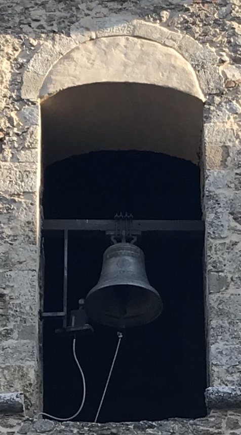 Chiesa di Santa Maria del Soccorso a Caccuri